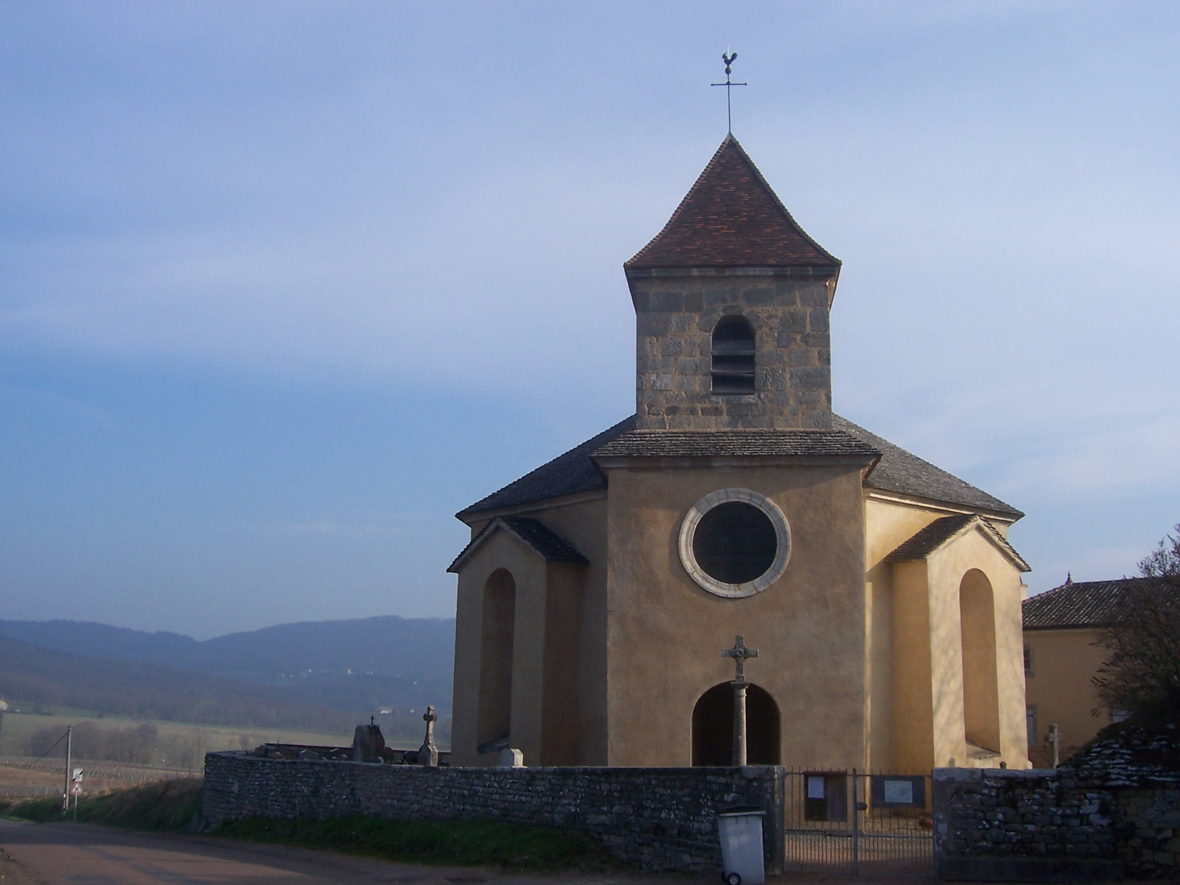 Eglise de Barizey